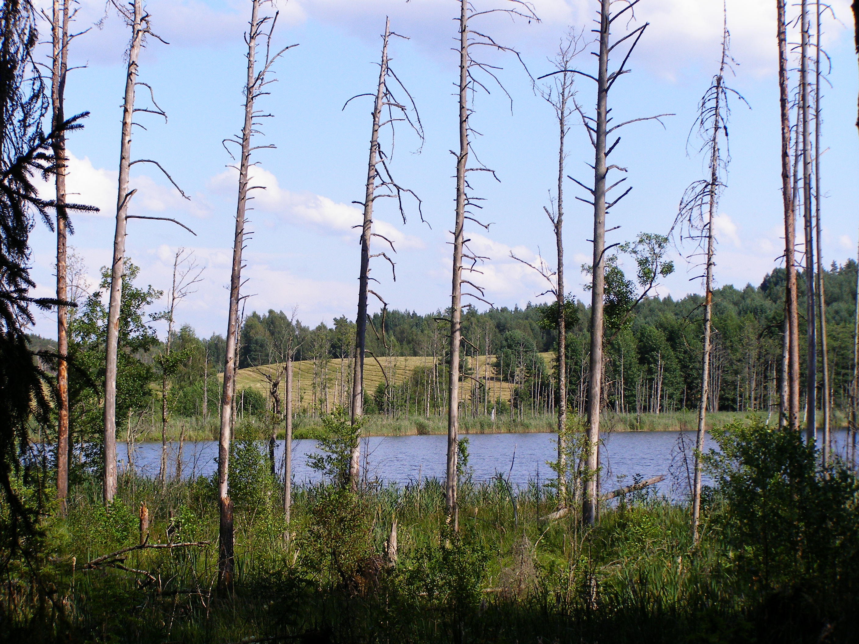 Savijärv Karula rahvuspargis (põhjaotsa lähedal).